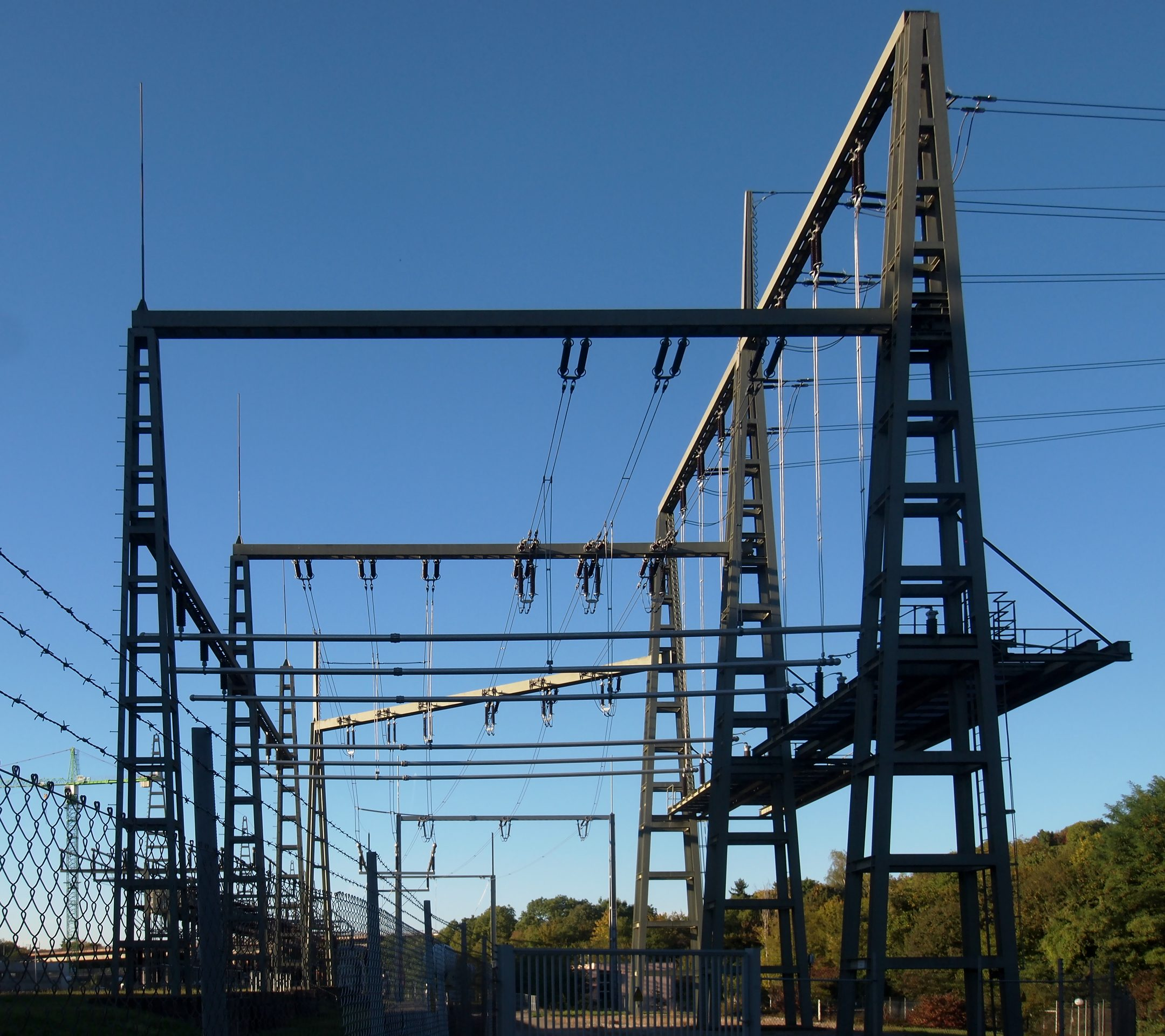 Die umständliche Einführung der 110kV-Leitung an der Stelle der früheren 220kV-Transformatoren.